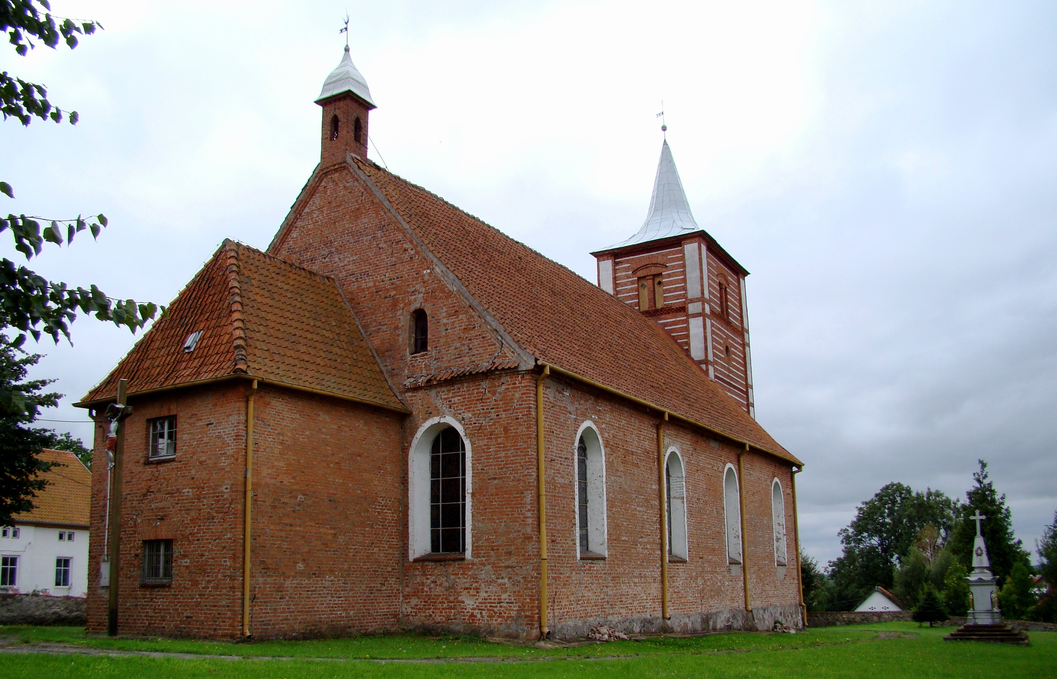 Zabytkowy kościół parafialny p.w. Marii Magdaleny w Bieniewie.